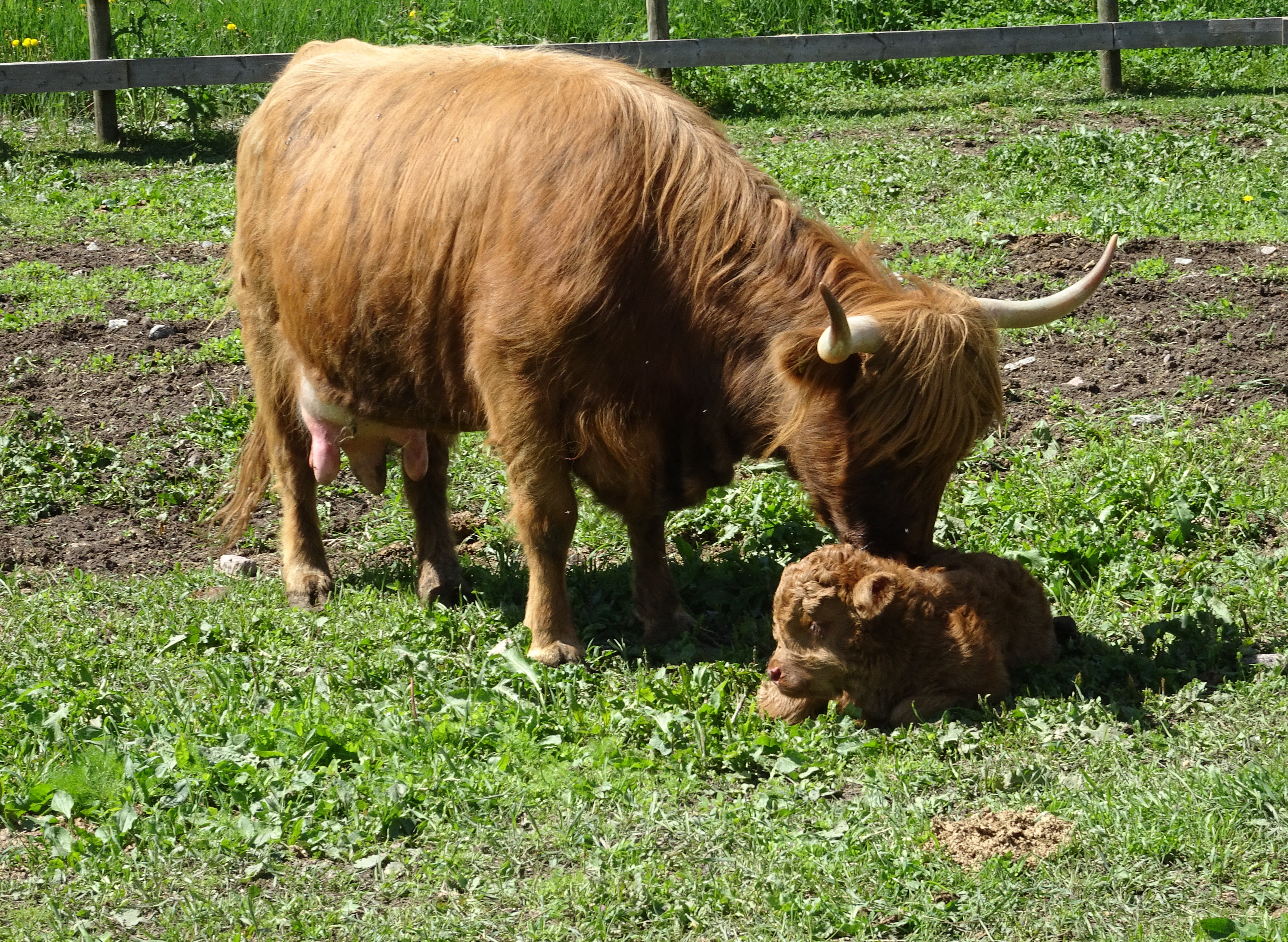 Highland cattle vid Väsby gård, ko och kalv